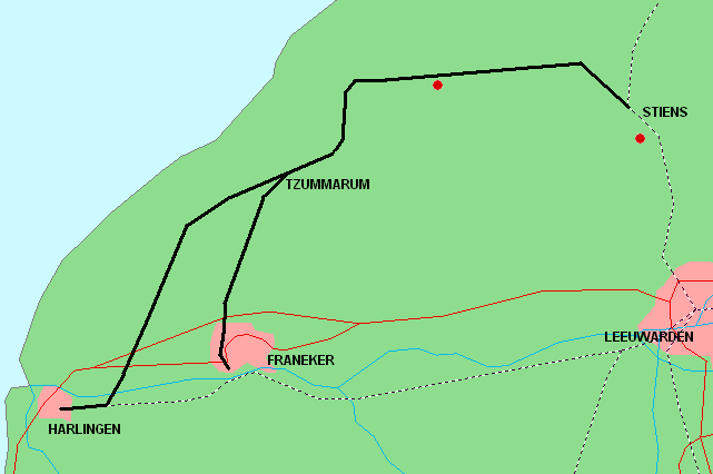 kaart van het tracé van spoorlijn Stiens-Harlingen/Franeker